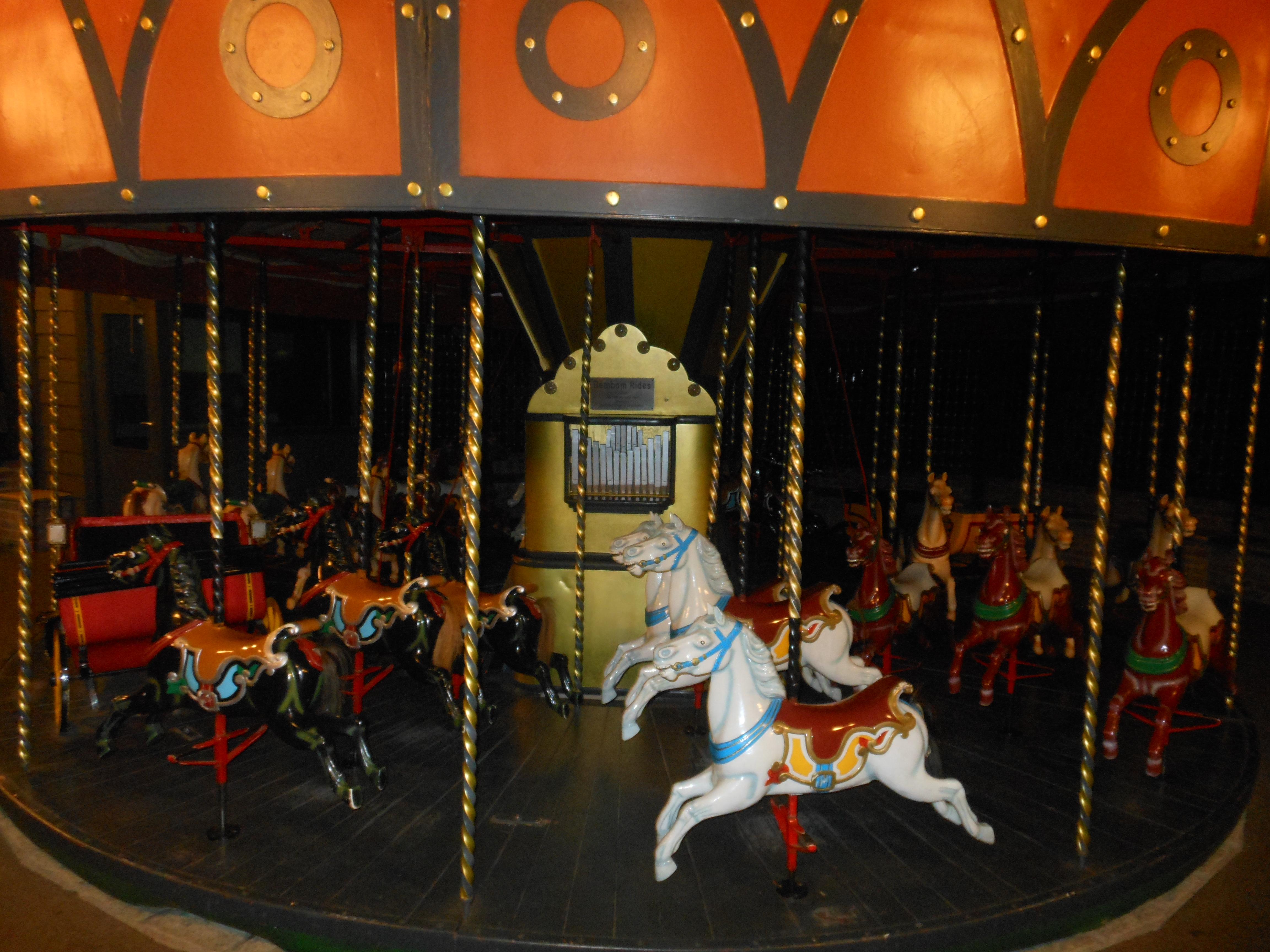 De kleine draaimolen "Merry Go Mad" in het Nederlandse park Attractiepark Slagharen te Overijssel. Gebouwd door de oprichter van het park zelf, Henk Bemboom, onder de noemer "Bemboom Rides".